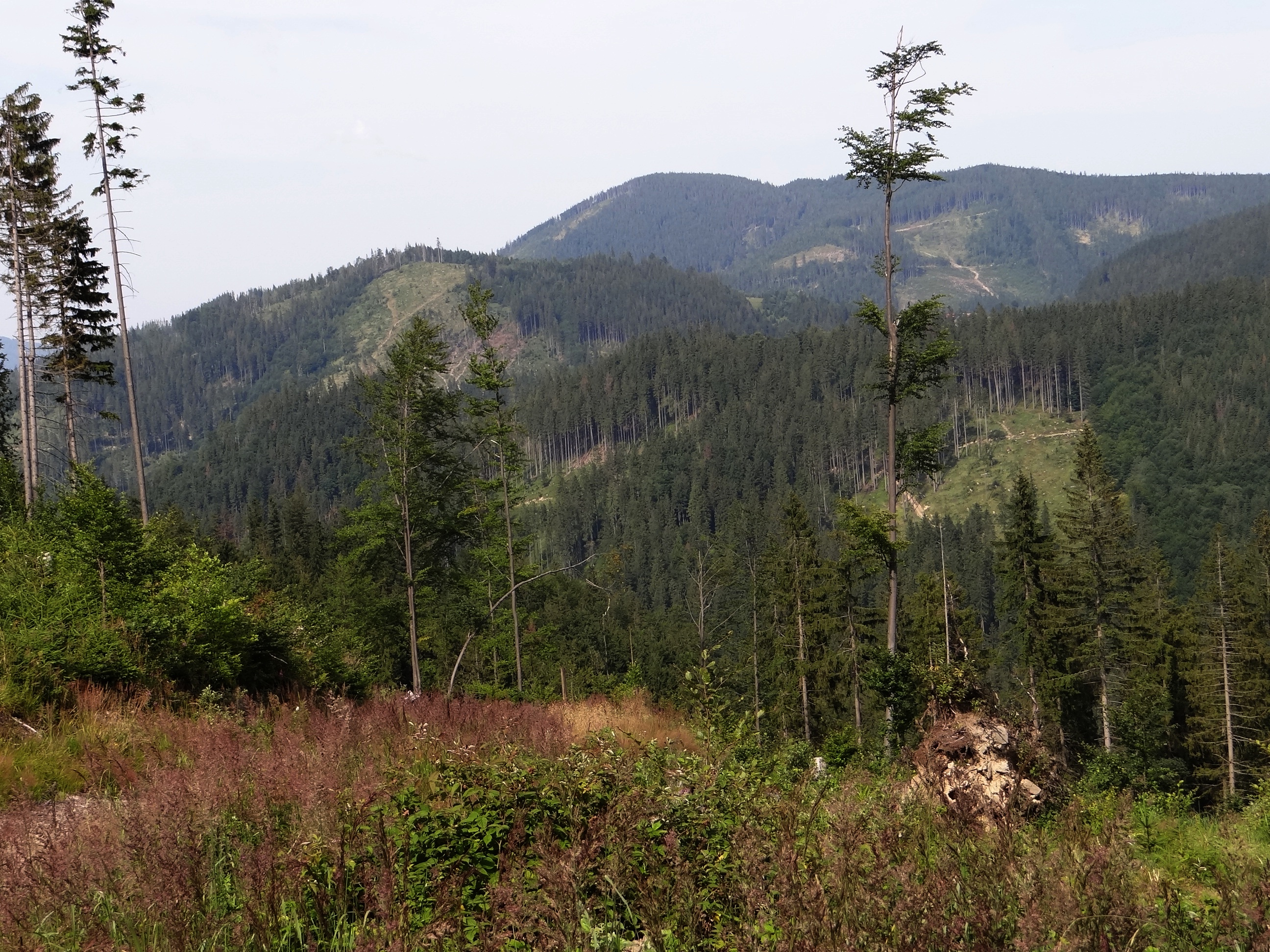 Kiczorka (Młada Hora) i Muńcoł - widok z zielonego szlaku Przełęcz Przegibek - Rycerka Dolna